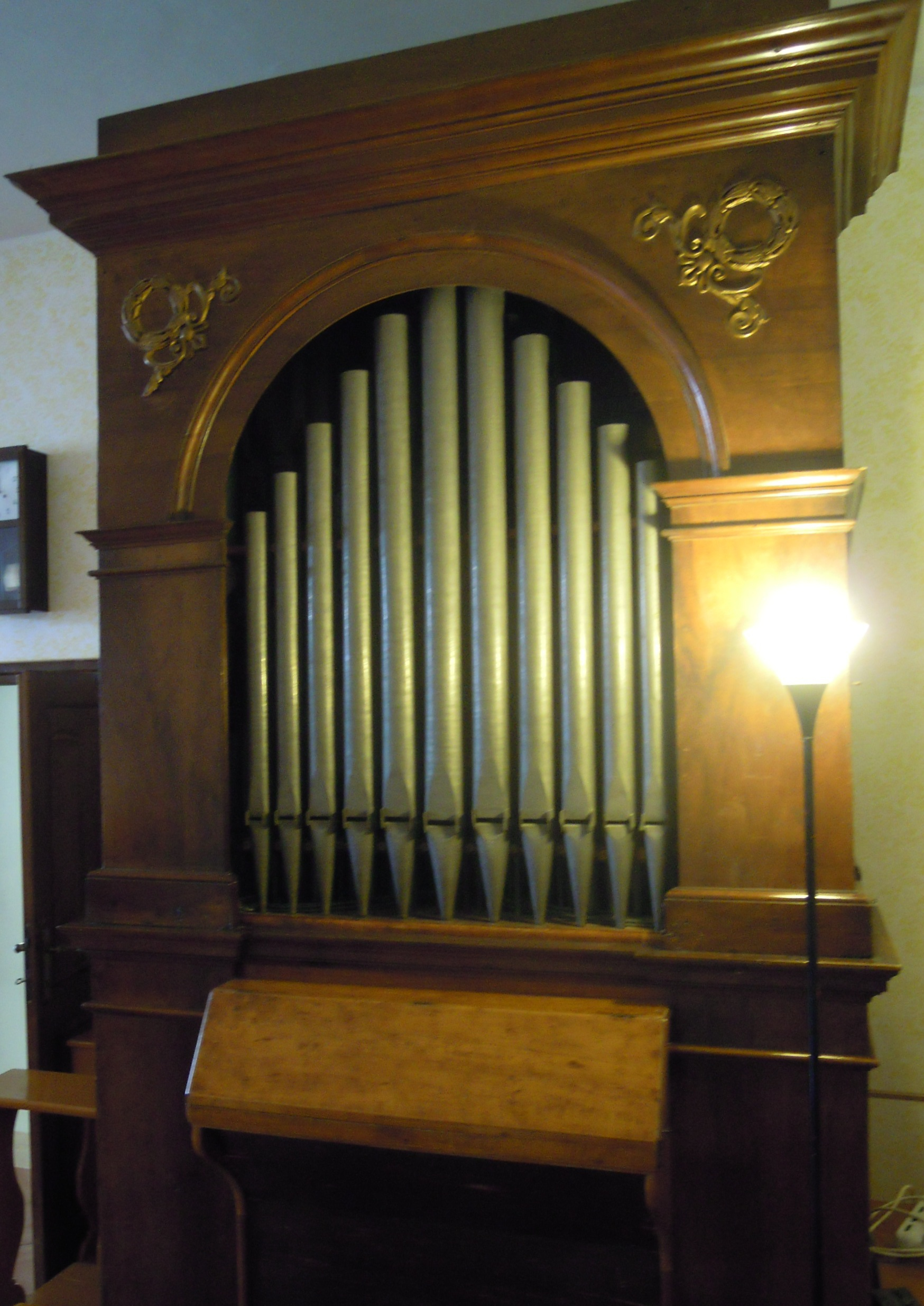 L'organo Rotelli (1907, I+P/6) della chiesa della Santissima Addolorata a Gaeta